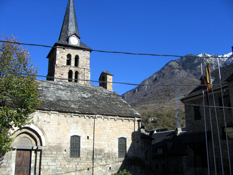 Glèisa dera Assompcion de Maria (segle XII) a Bossòst